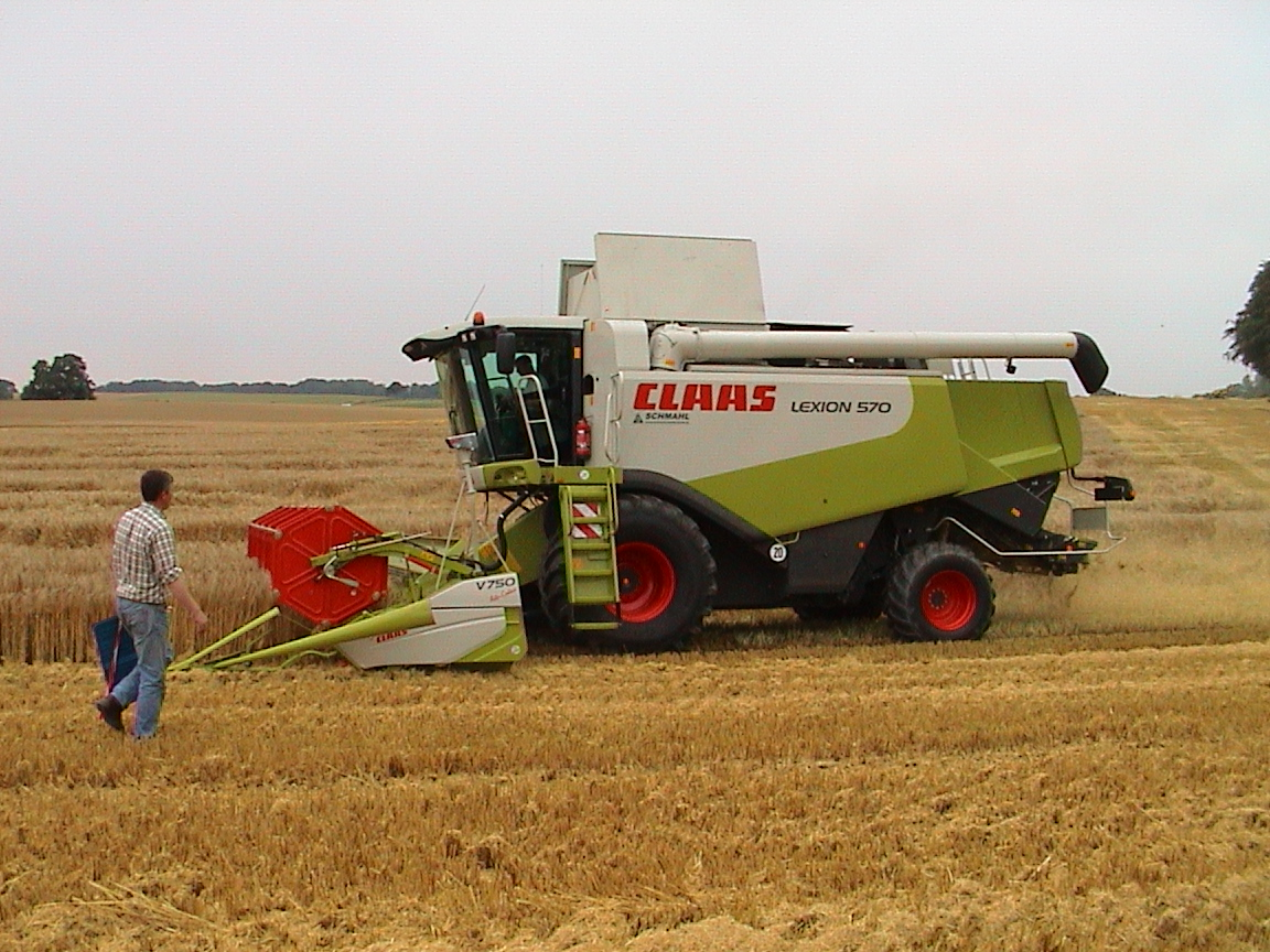 Mähdrescher Class Lexion 570